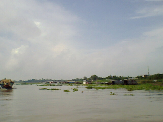 An Phu river, Sông Hậu đoạn ngang thị trấn An Phú